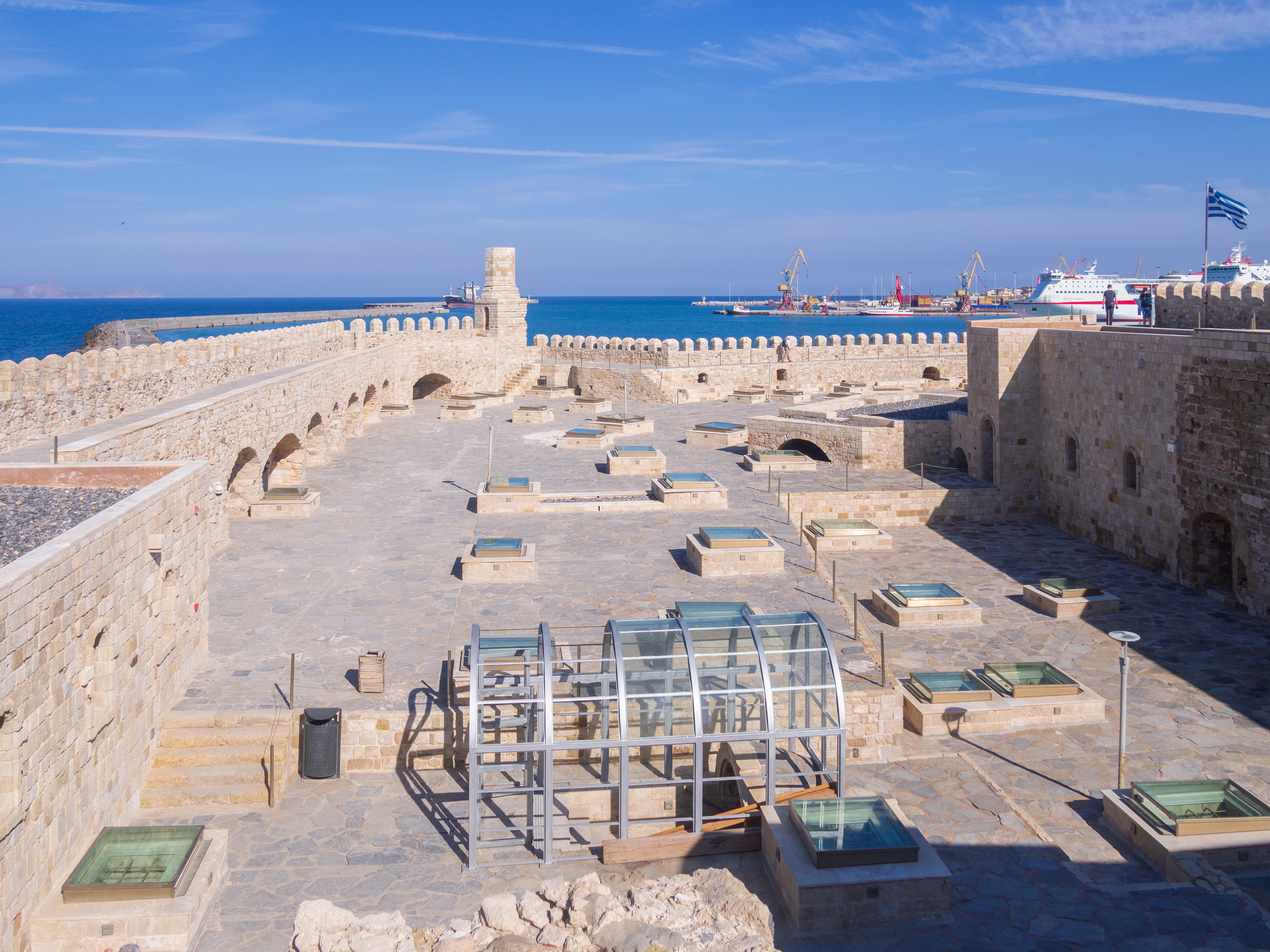 Θαλάσσιο Φρούριο ενετικού λιμένος Ηρακλείου (Κούλες)«Κούλες»